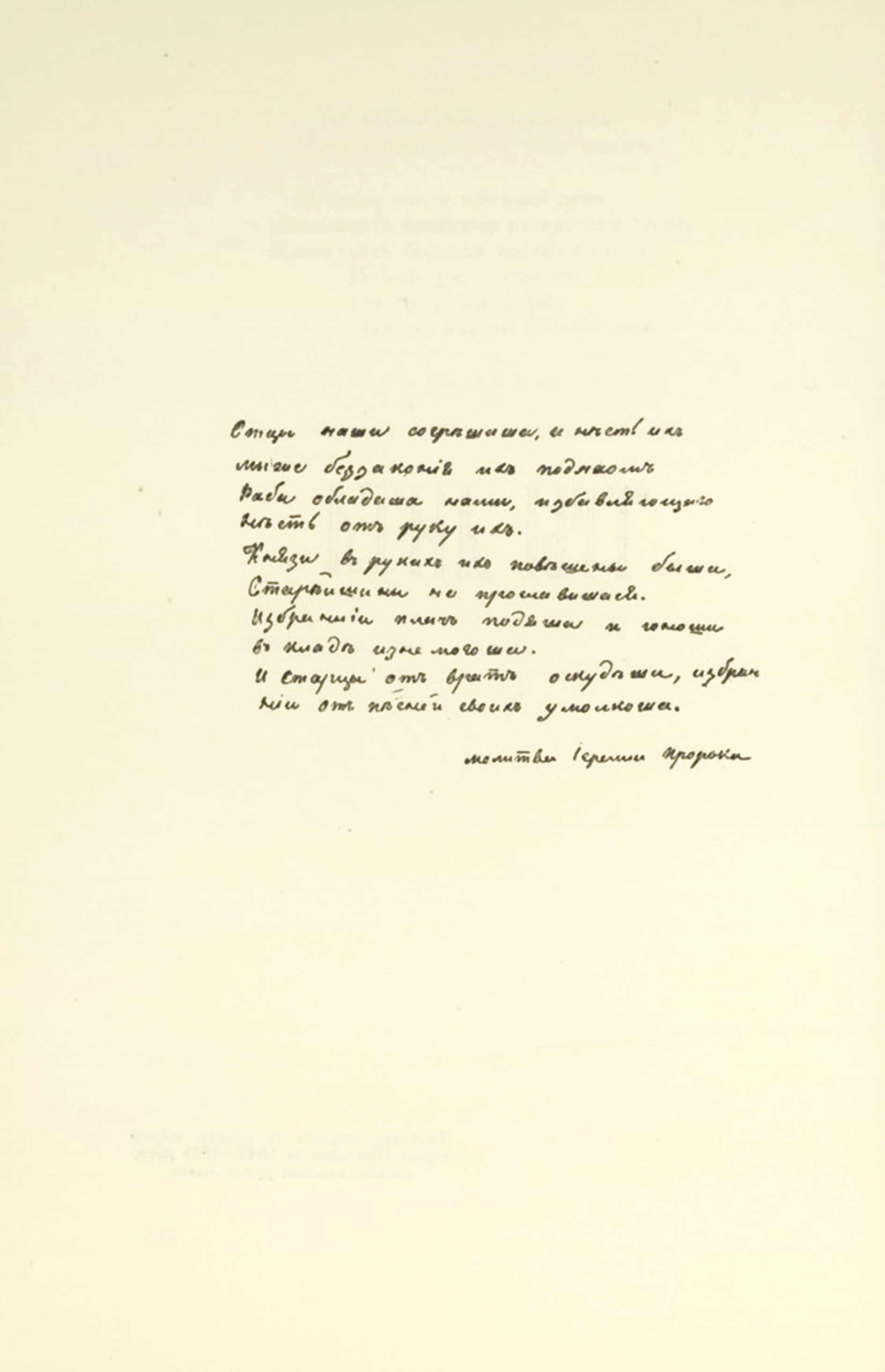 Повна збірка творів в десяти томах / ред. кол.: акад. О. Е. Корнійчук, Ф. А. Редько, акад. П. Г. Тичина, М. Т. Рильский, Д. Д. Копиця, проф. С. І. Маслов, акад. О. І. Білецький, проф. П. М. Попов, М. В. Геппенер; Академія наук УРСР. – Київ, 1939. С. 224